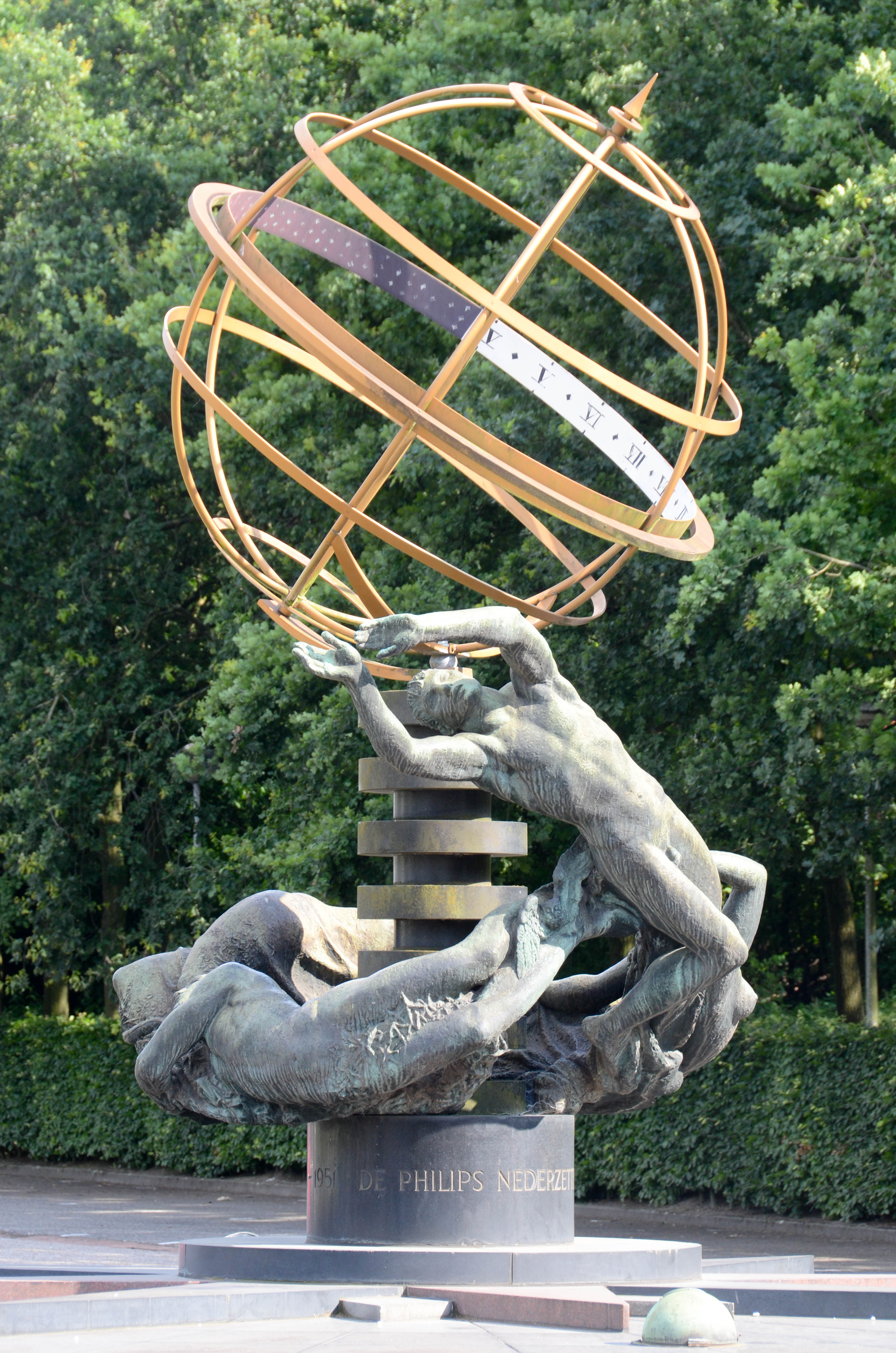 Zonnewijzer die voor het Philips Ontspanningscentrum heeft gestaan en later is verplaatst naar het terrein van het Evoluon te Eindhoven.